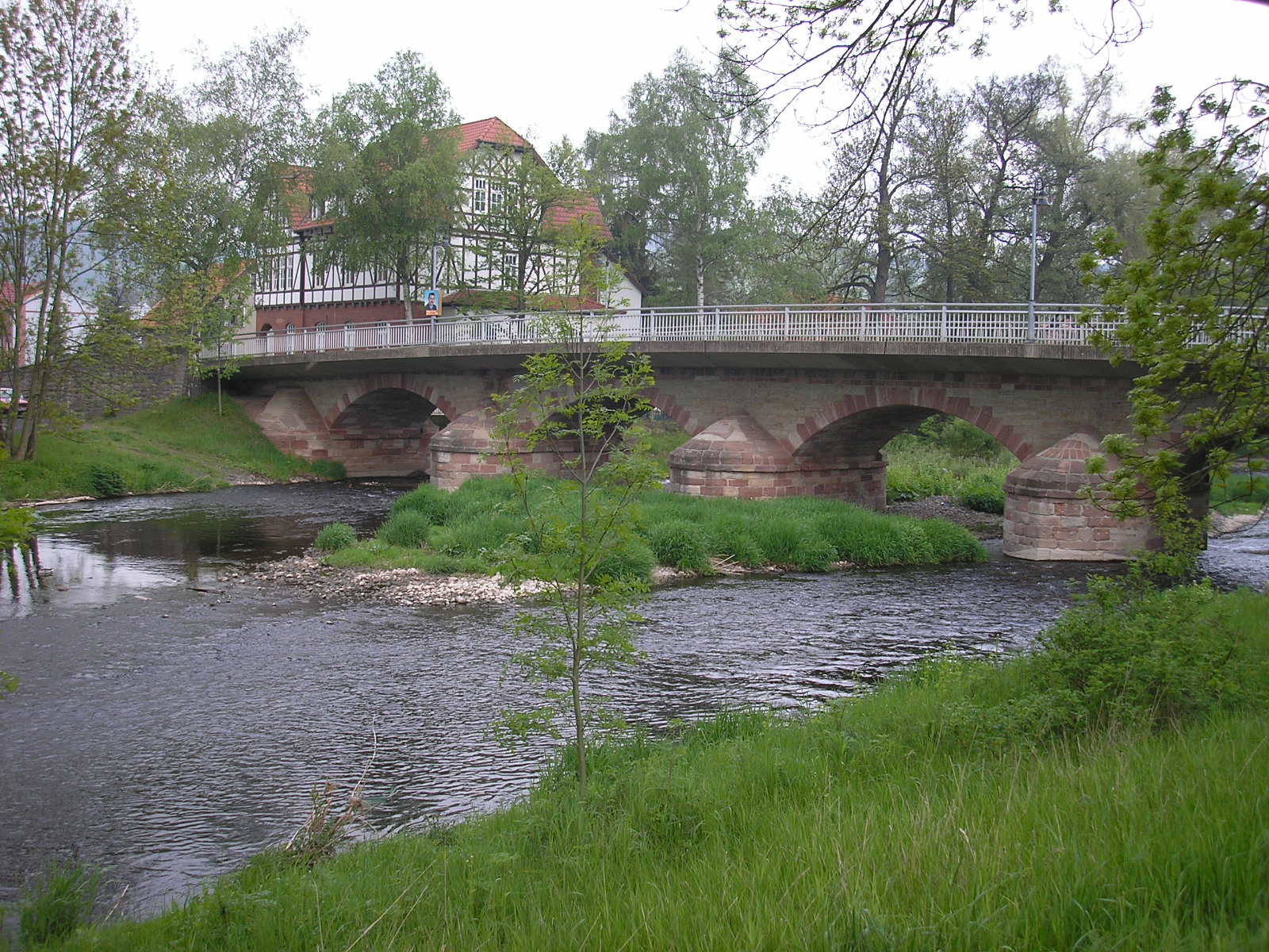 Eine Ulsterbrücke in Geisa (Rhön).